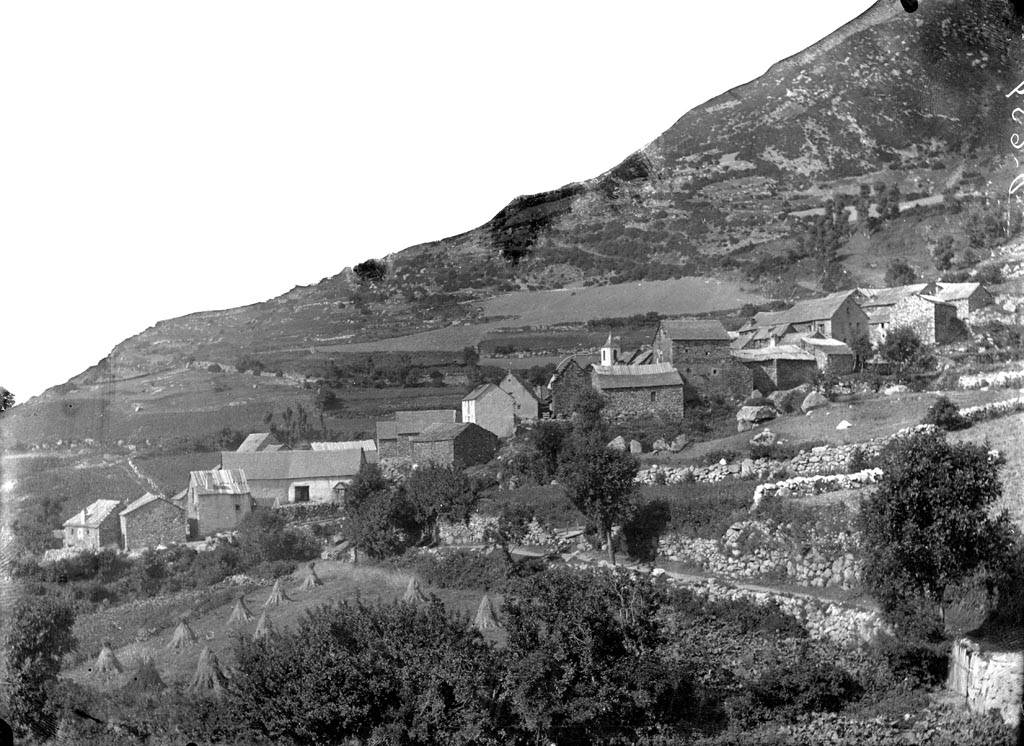 Imatge